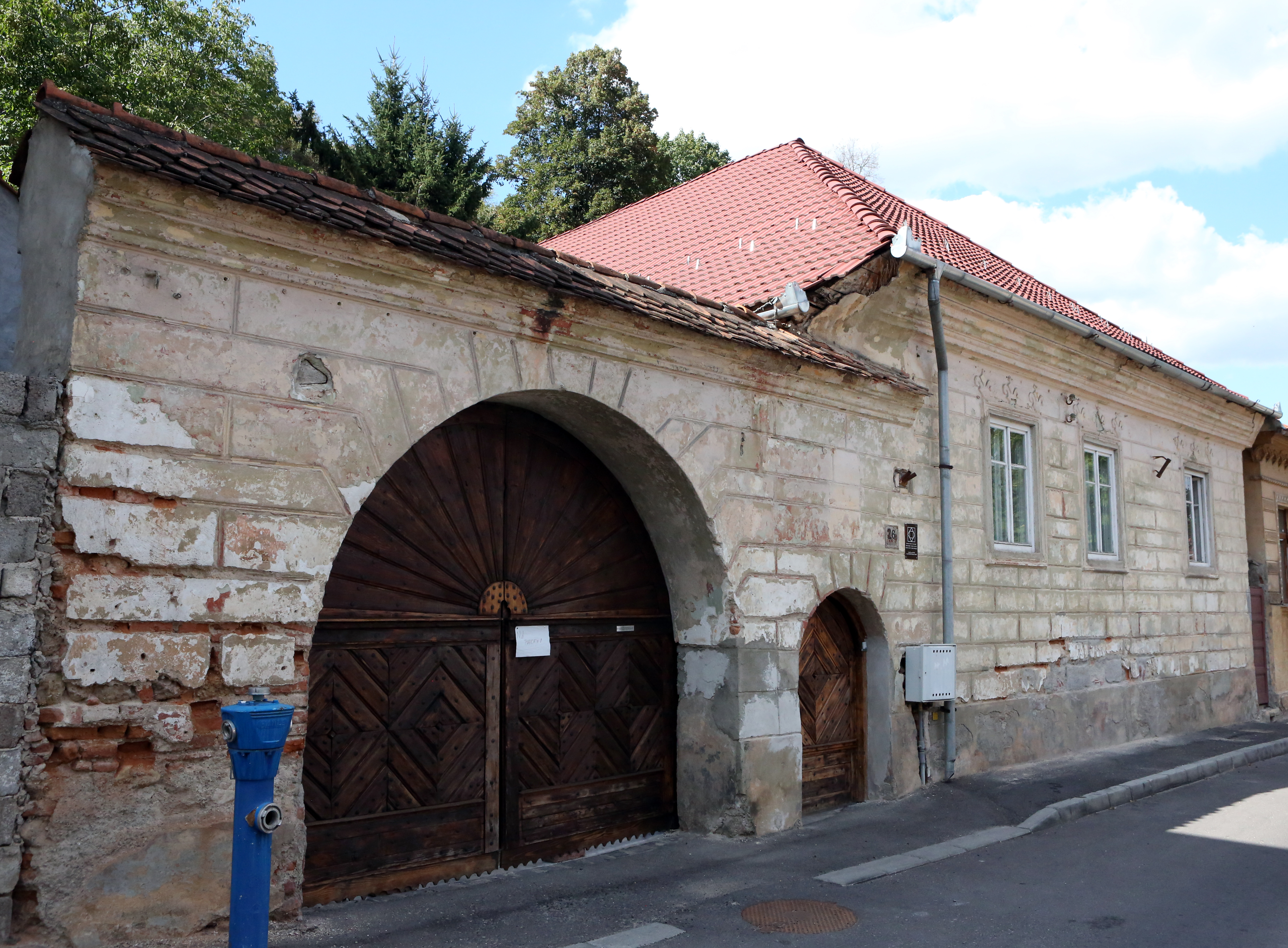 Casă și poartă de lemn